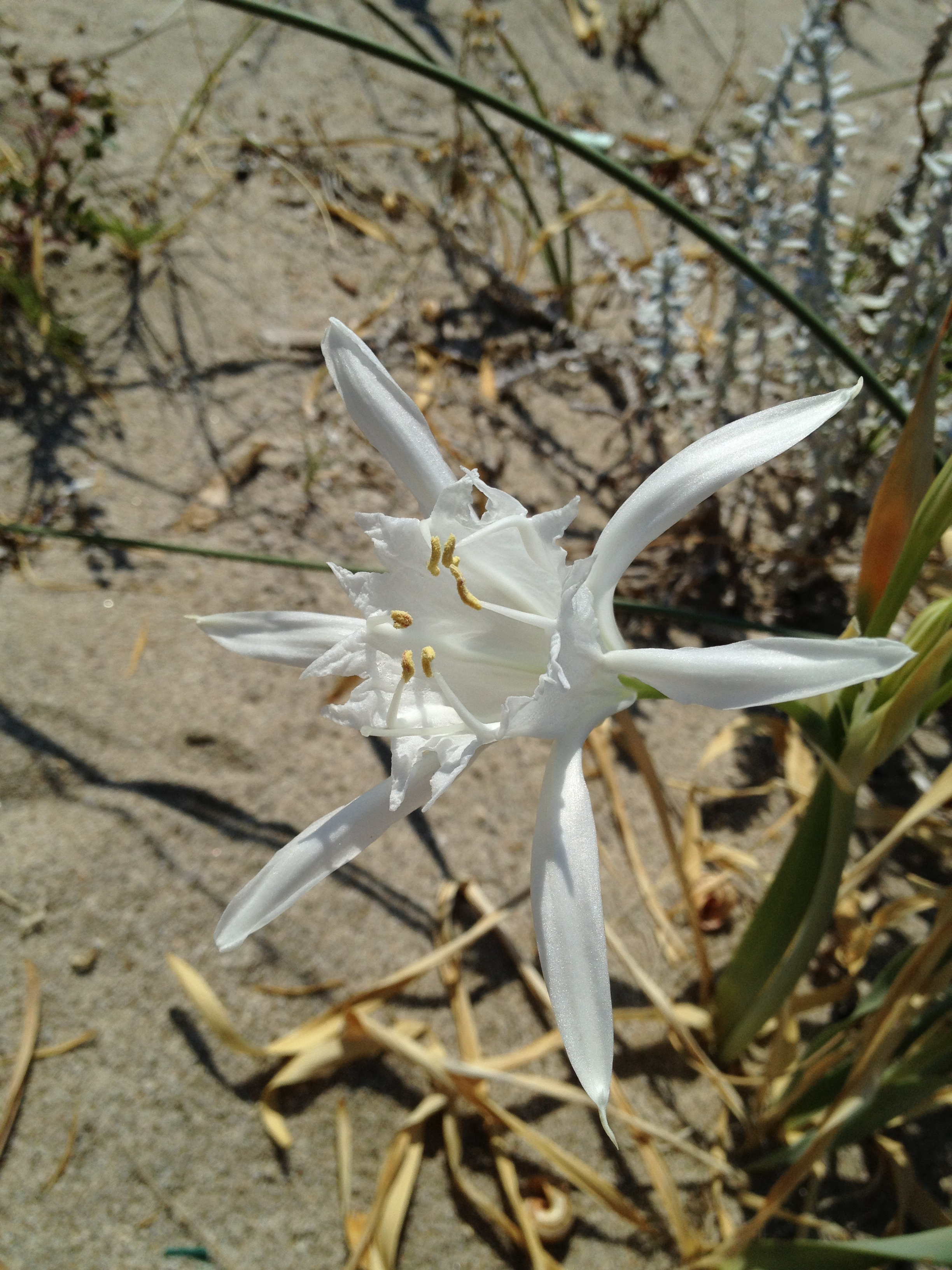 Impressionen vom Strand: Pancratium maritimum